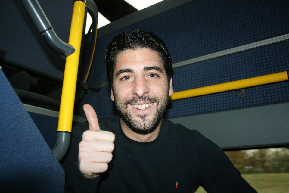 Luca Iodice (November 2011)